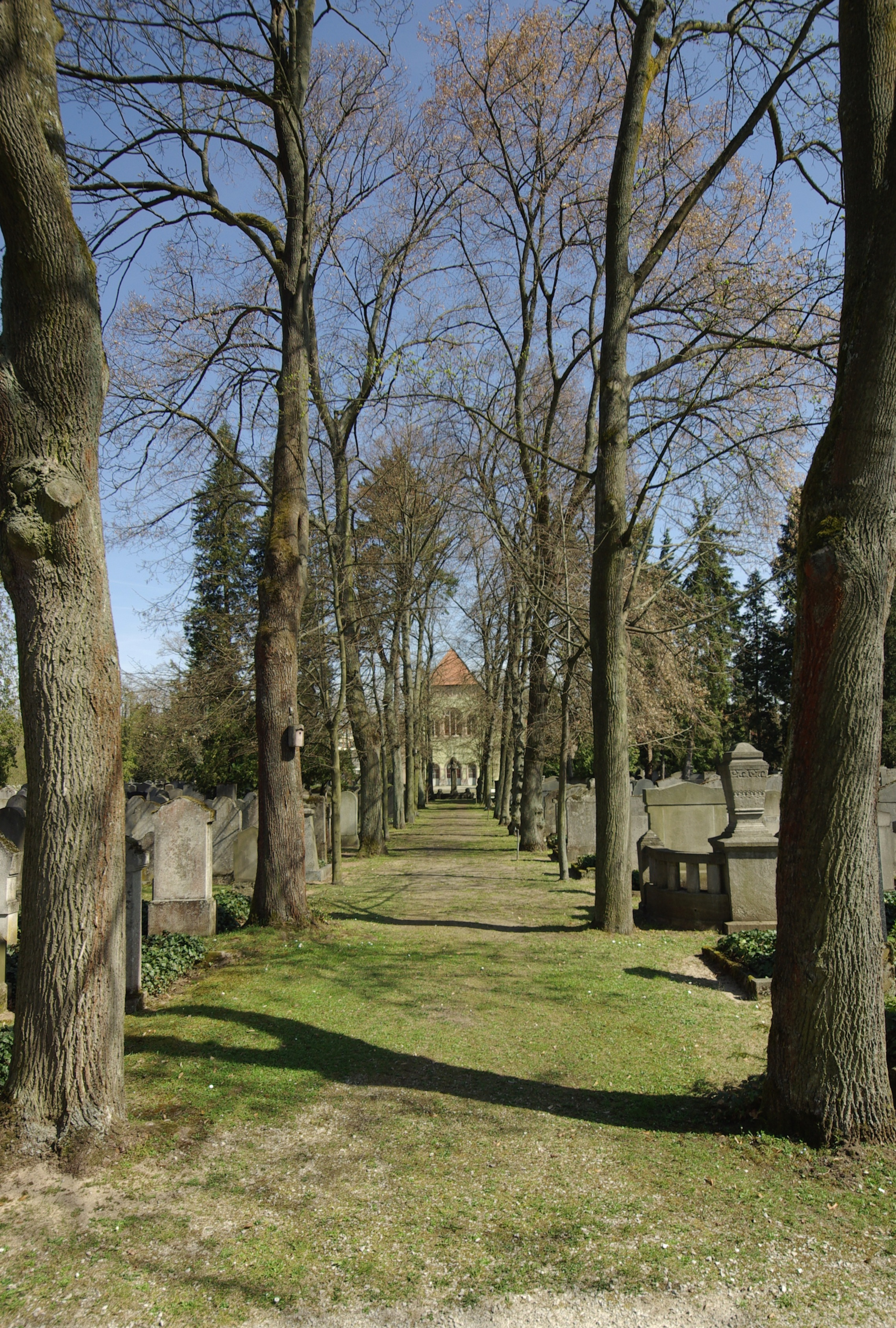 Neuer Jüdischer Friedhof in Nürnberg